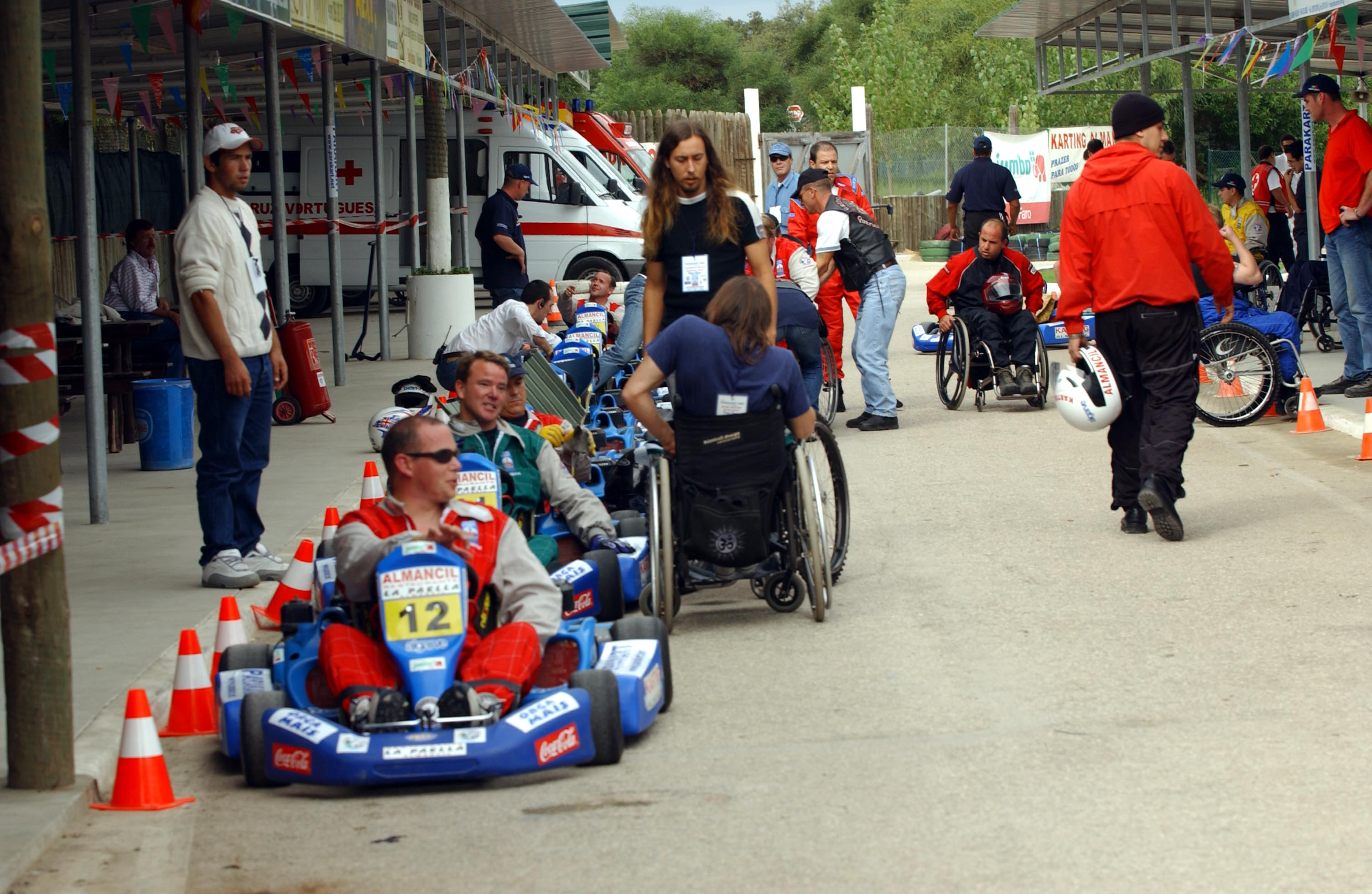 Parakart : vue des boxs